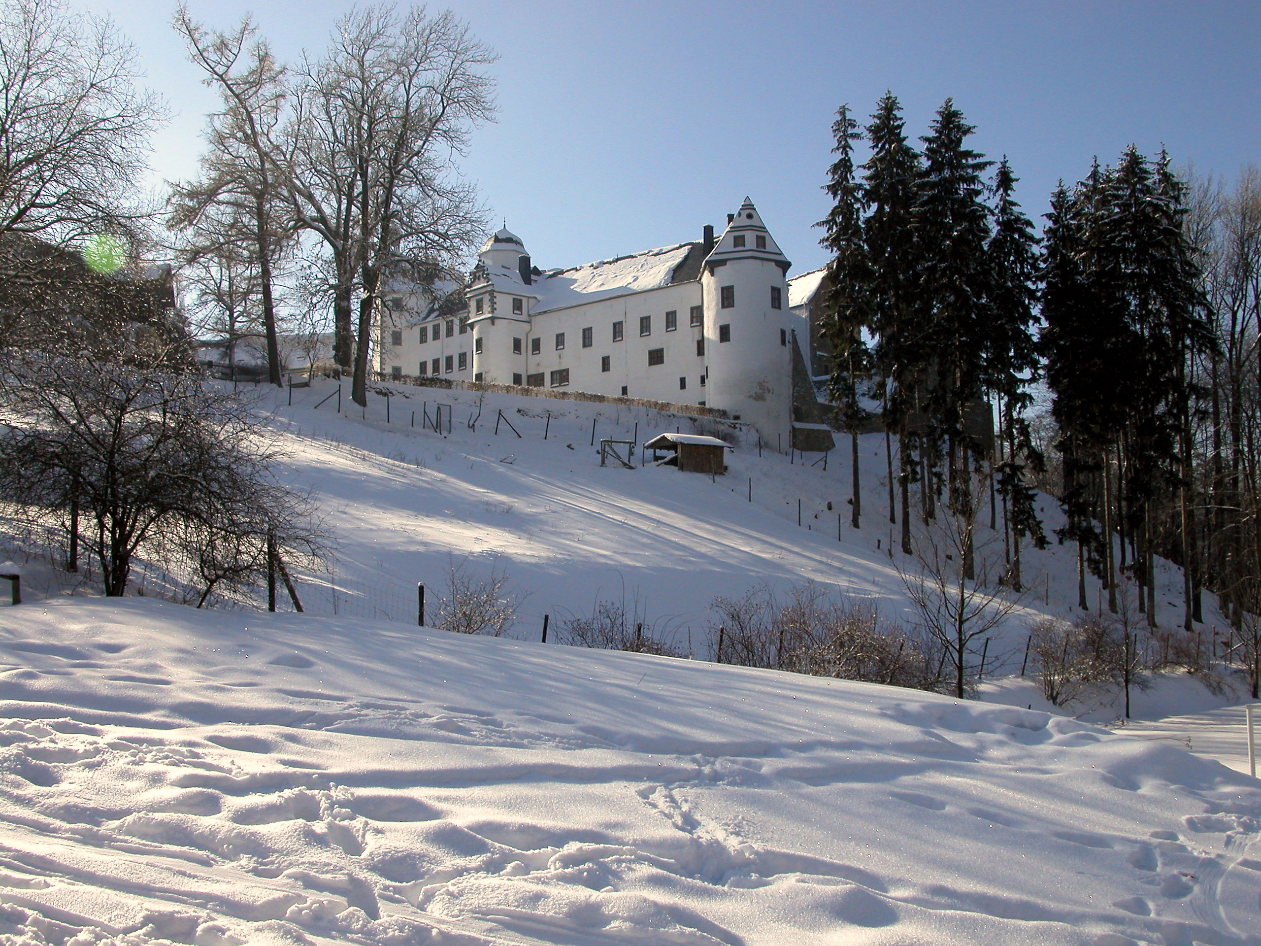 05.02.2005 01778 Lauenstein (Altenberg): Burg/Schloß (GMP: 50.784200,13.821239): Spätgotische Anlage, 14. und 15 Jh., im 16. und 17. Jh. umgebaut und ergänzt. Sicht vom Tierpark aus Nordosten. [DSCN5865.TIF]20050205300.DR.JPG(c)Blobelt